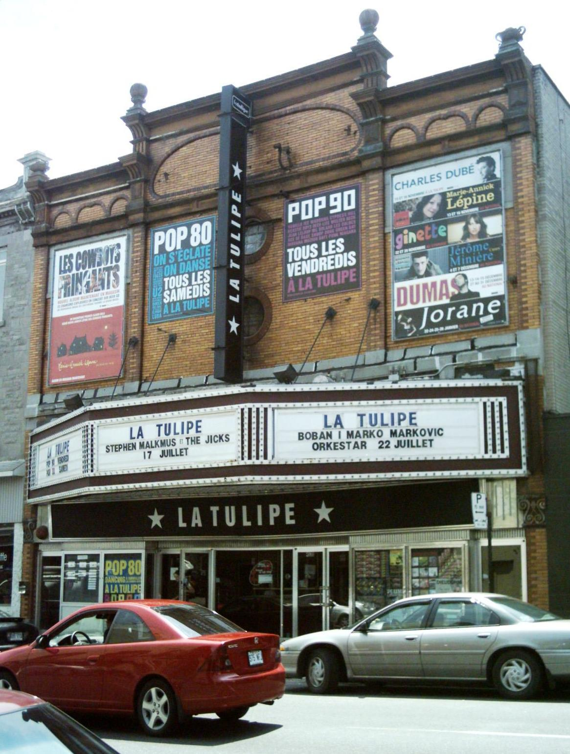 La tulipe (autrefois le Théâtre des Variétés) est une salle de spectacle située au 4530 rue Papineau à Montréal.